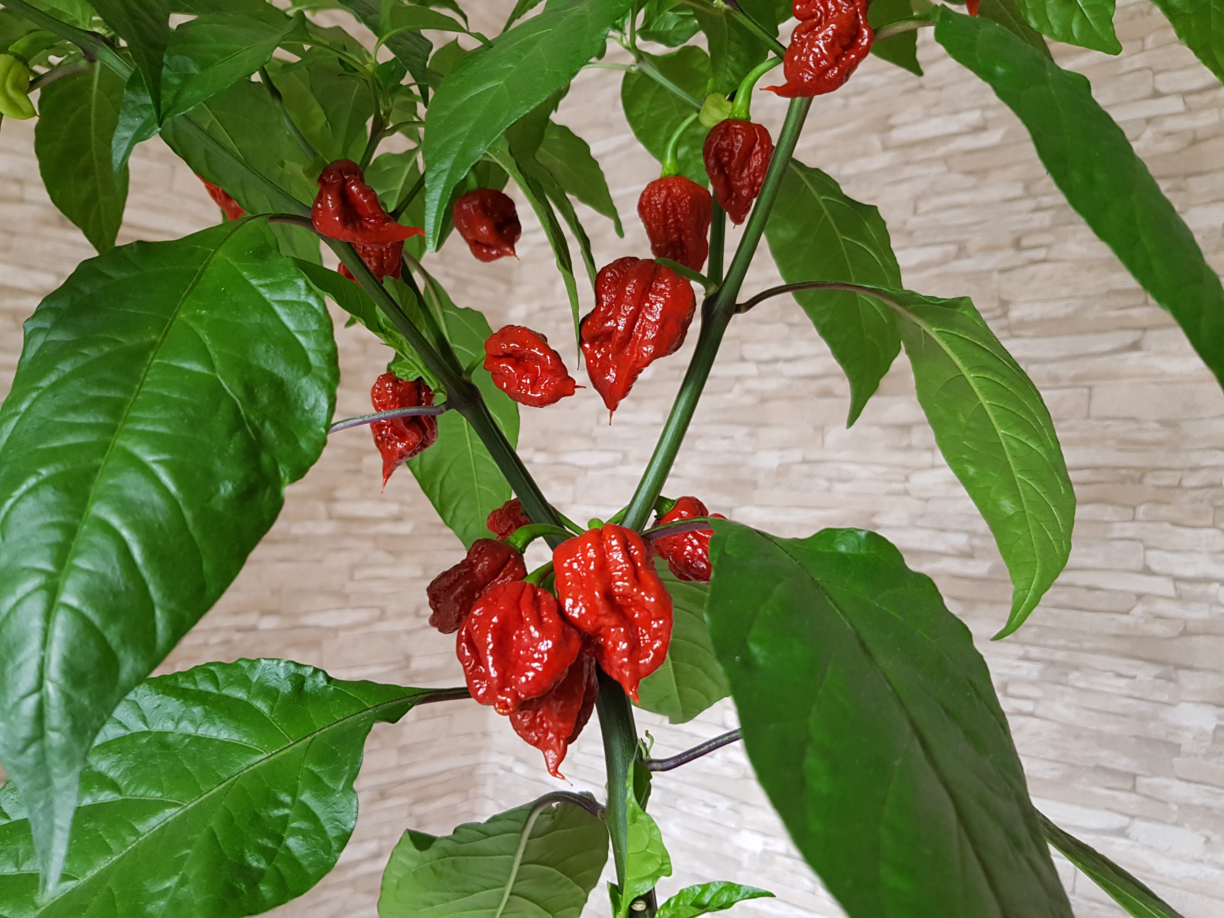 Carolina Reaper Pflanze mit reifen dunkel rötlichen Früchten